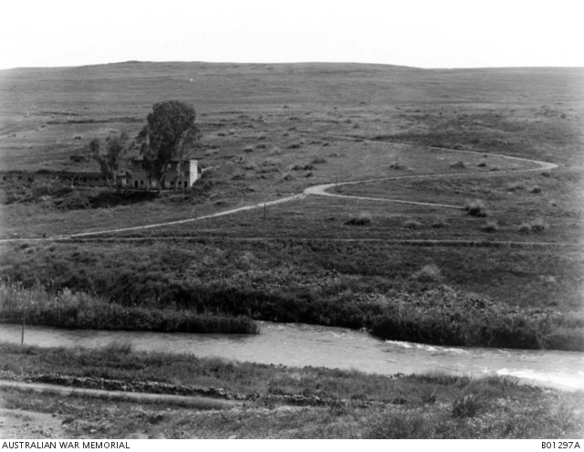 בית המכס התחתון 1918